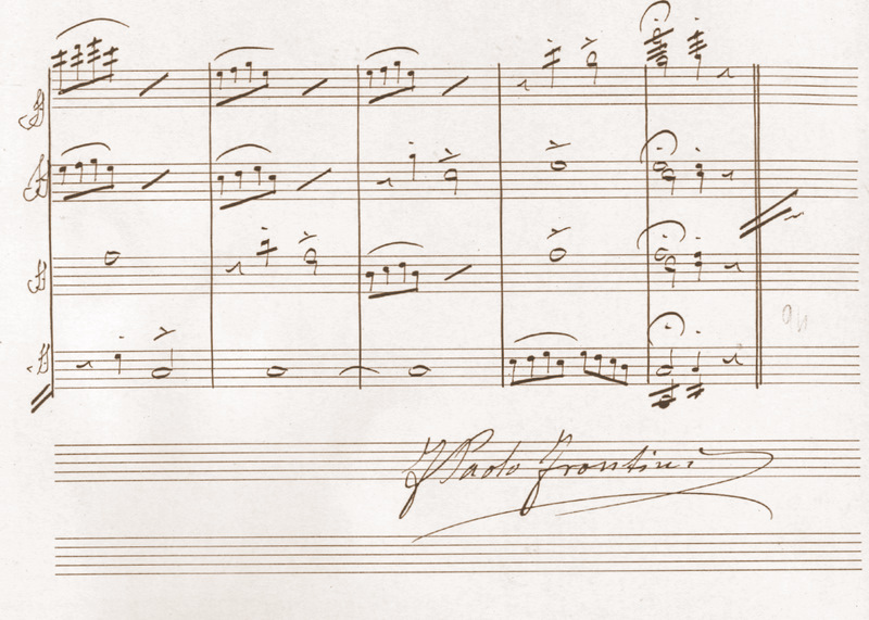 fine spartito autografo di Francesco Paolo Frontini